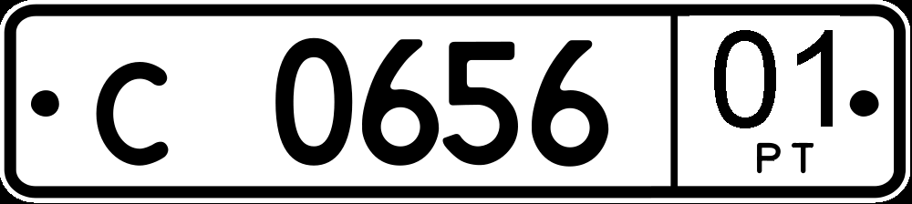 Номера физических лиц Таджикистана, стандарт 1996 года, ранняя модификация